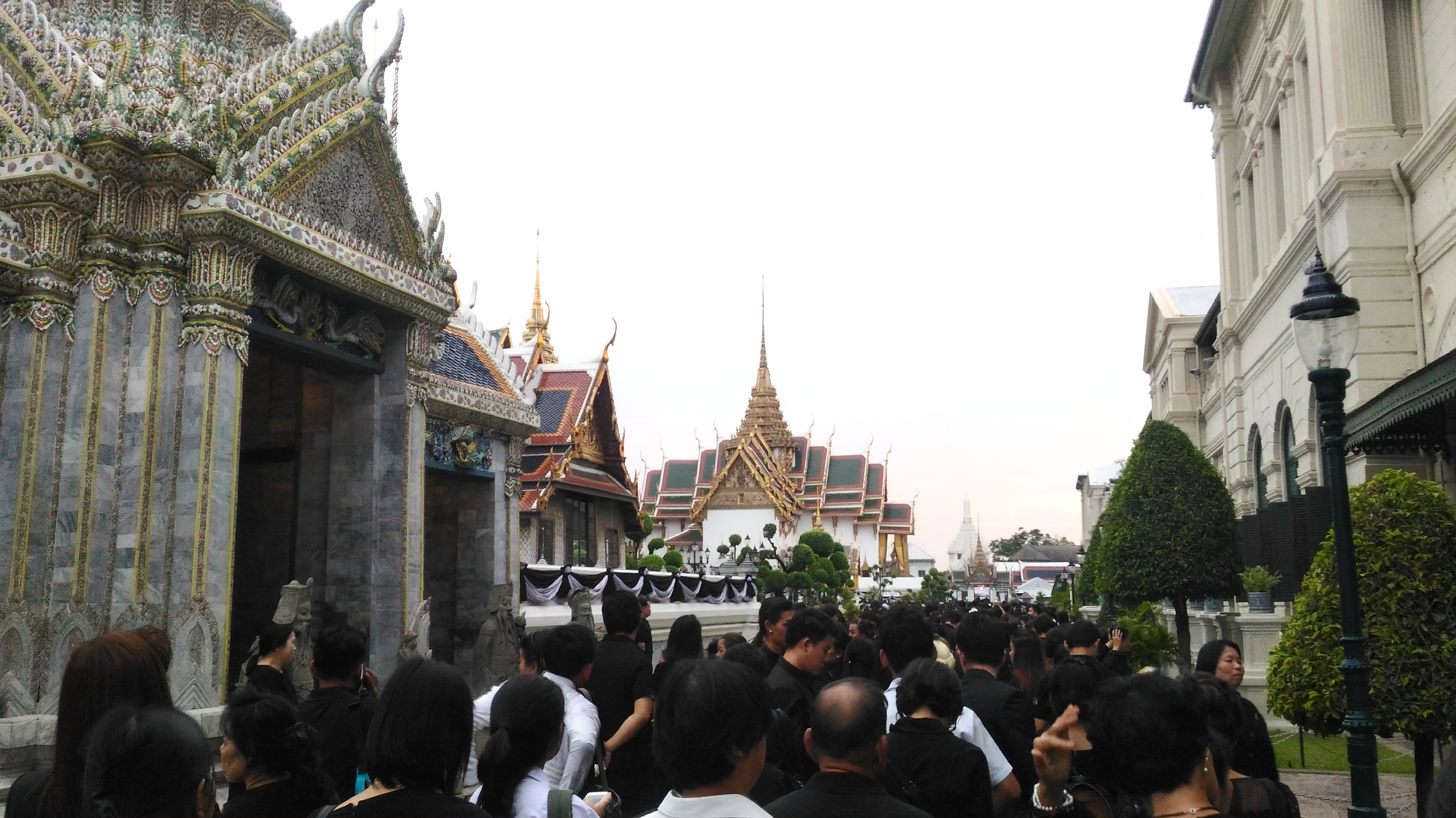 ประชาชนต่อแถวเพื่อรอเข้าสักการะพระบรมศพ พระบาทสมเด็จพระปรมินทรมหาภูมิพลอดุลยเดช สยามินทราธิราช บรมนาถบพิตร ซึ่งประดิษฐาน ณ พระที่นังดุสิตมหาประสาท ในพระบรมมหาราชวัง กรุงเทพฯ บันทึกภาพเมื่อวันที่ 23 มกราคม พ.ศ. 2560